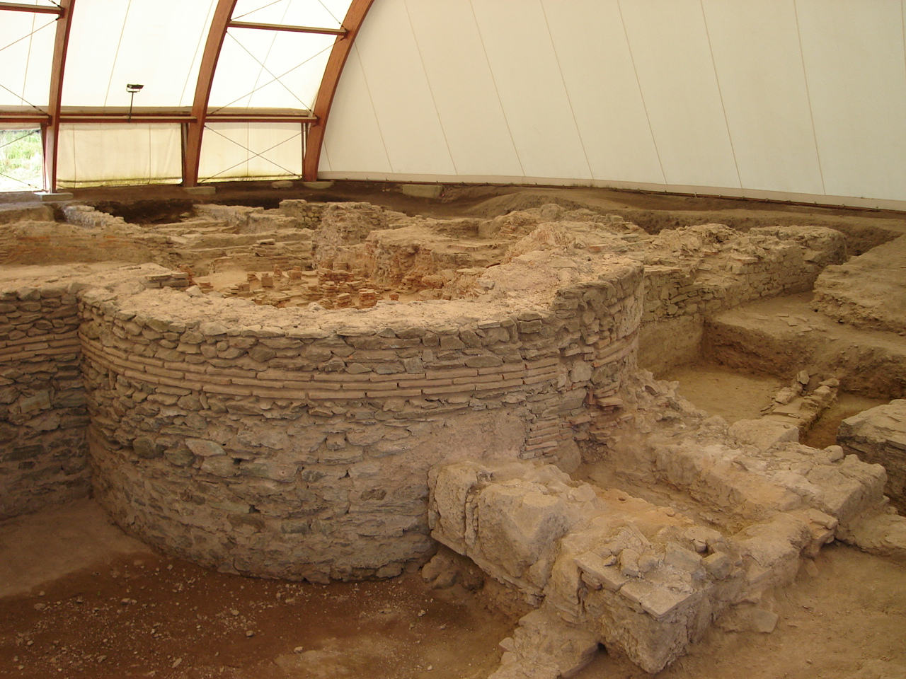 Scavi archeologici a Viminazio, vicino a Pozarevac